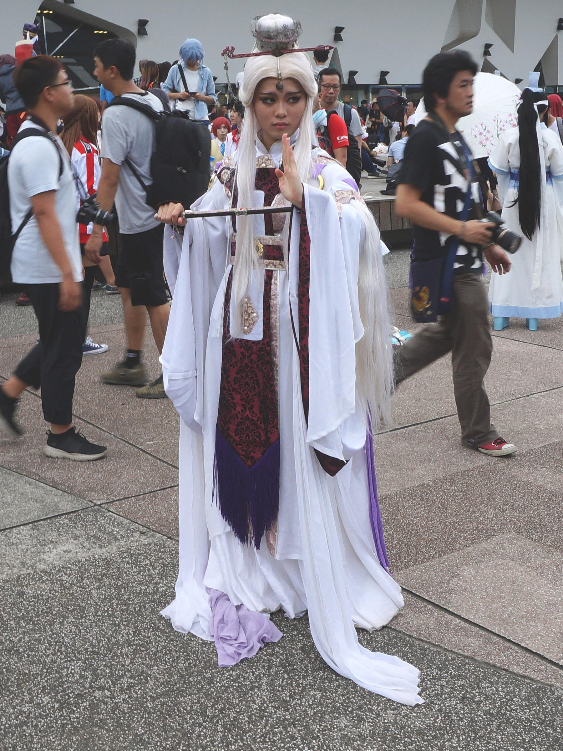 第30屆亞洲動漫創作展，霹靂布袋戲素還真cosplayer。